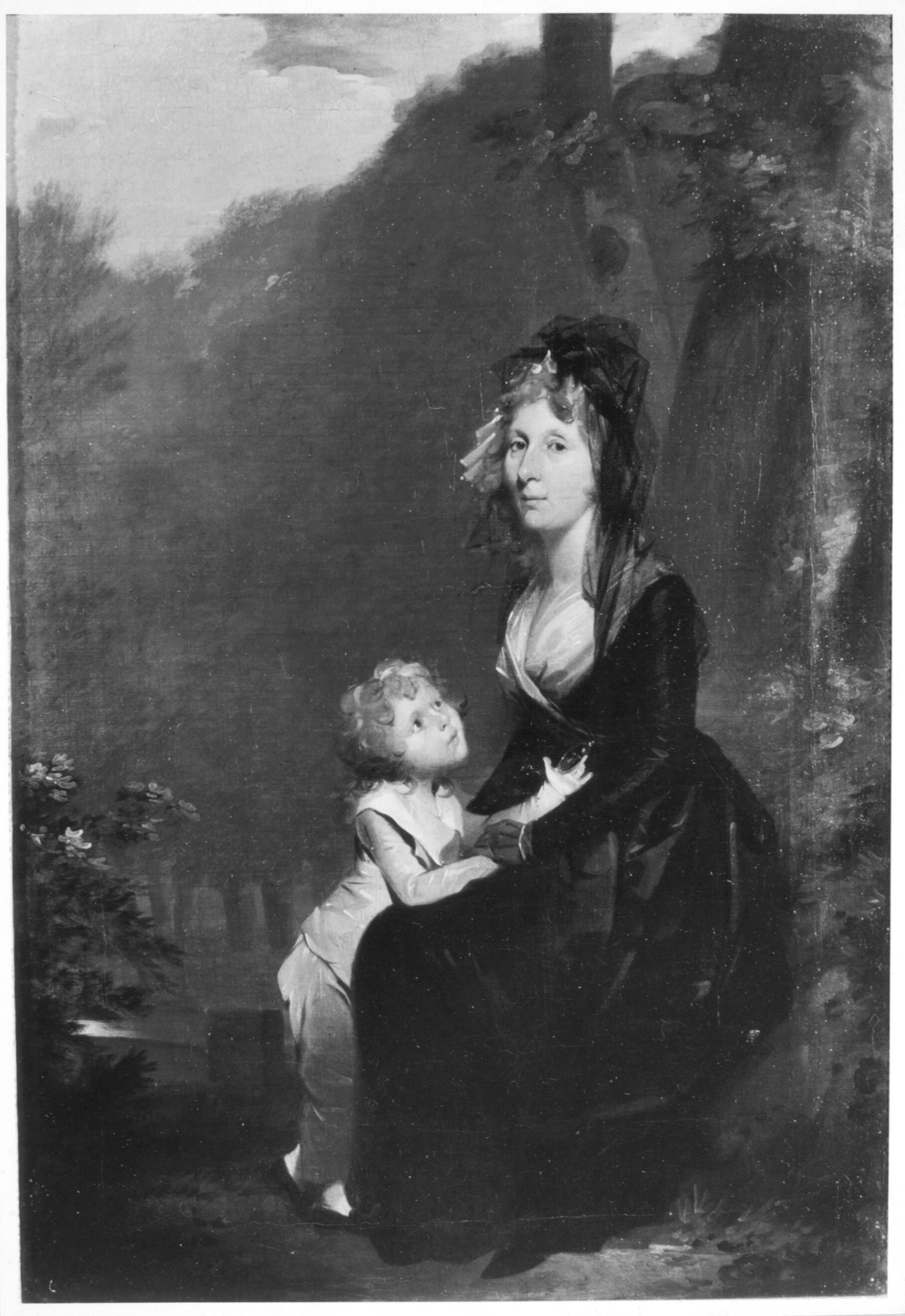 Dorothea Henriette Marie Louise de Pagniet Ehefrau von Vincent Maximiliaan van Tuyll van Serooskerken mit Sohn Vincent Johan Reinier baron van Tuyll van Serooskerken (1792-1840)